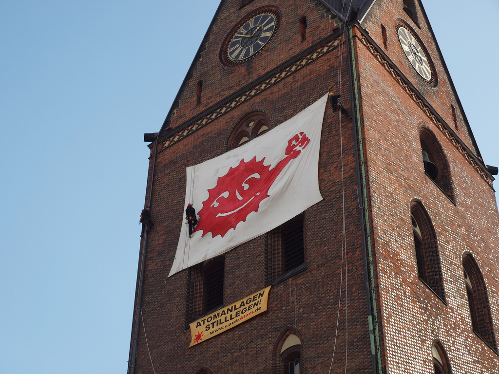 Anti-Atomkraft-Demonstration in Hamburg am 26.03.2011 This is a photograph of an architectural monument.